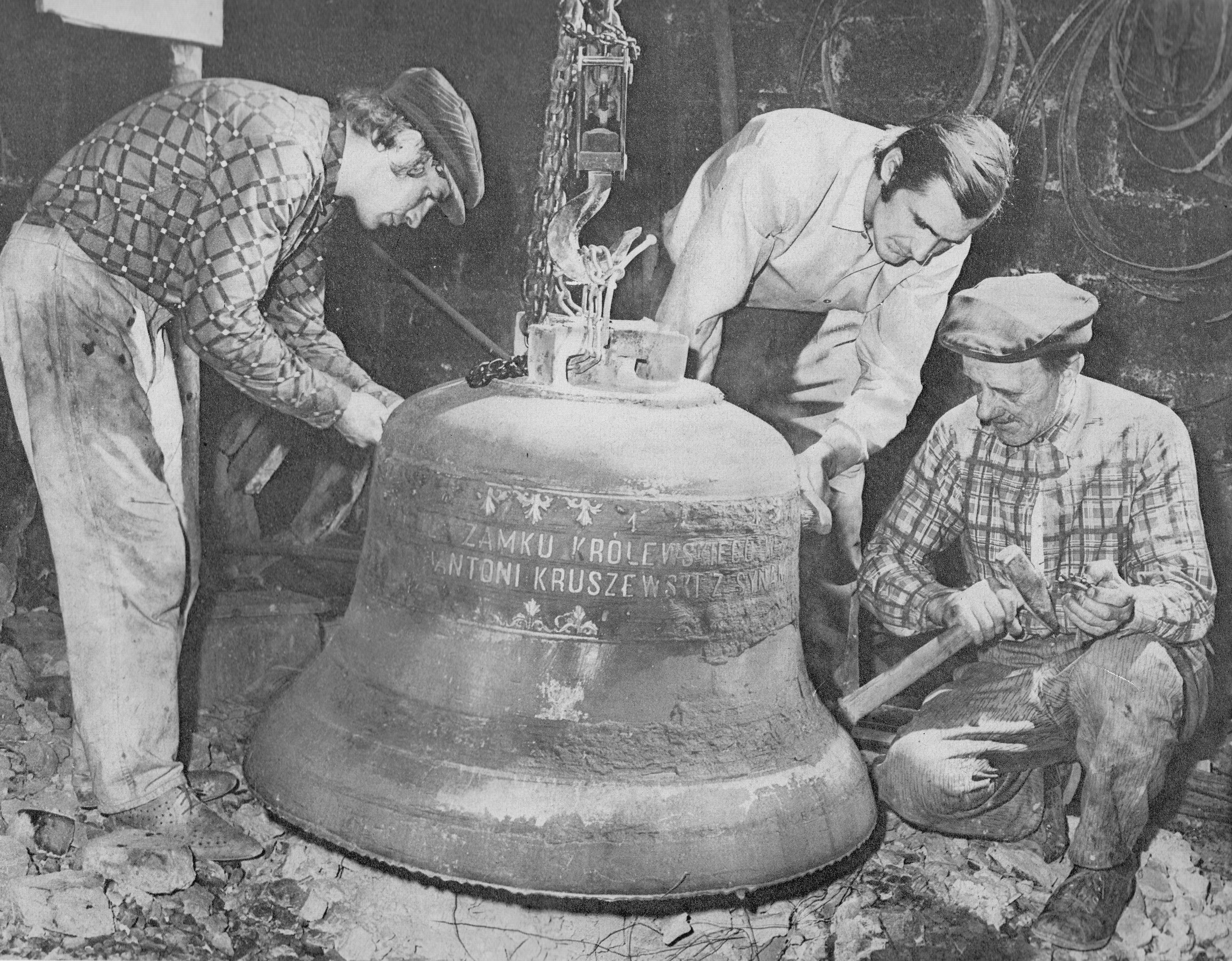 Antoni Kruszewski z synami z dzwonami wykonanymi dla zegara zamkowego